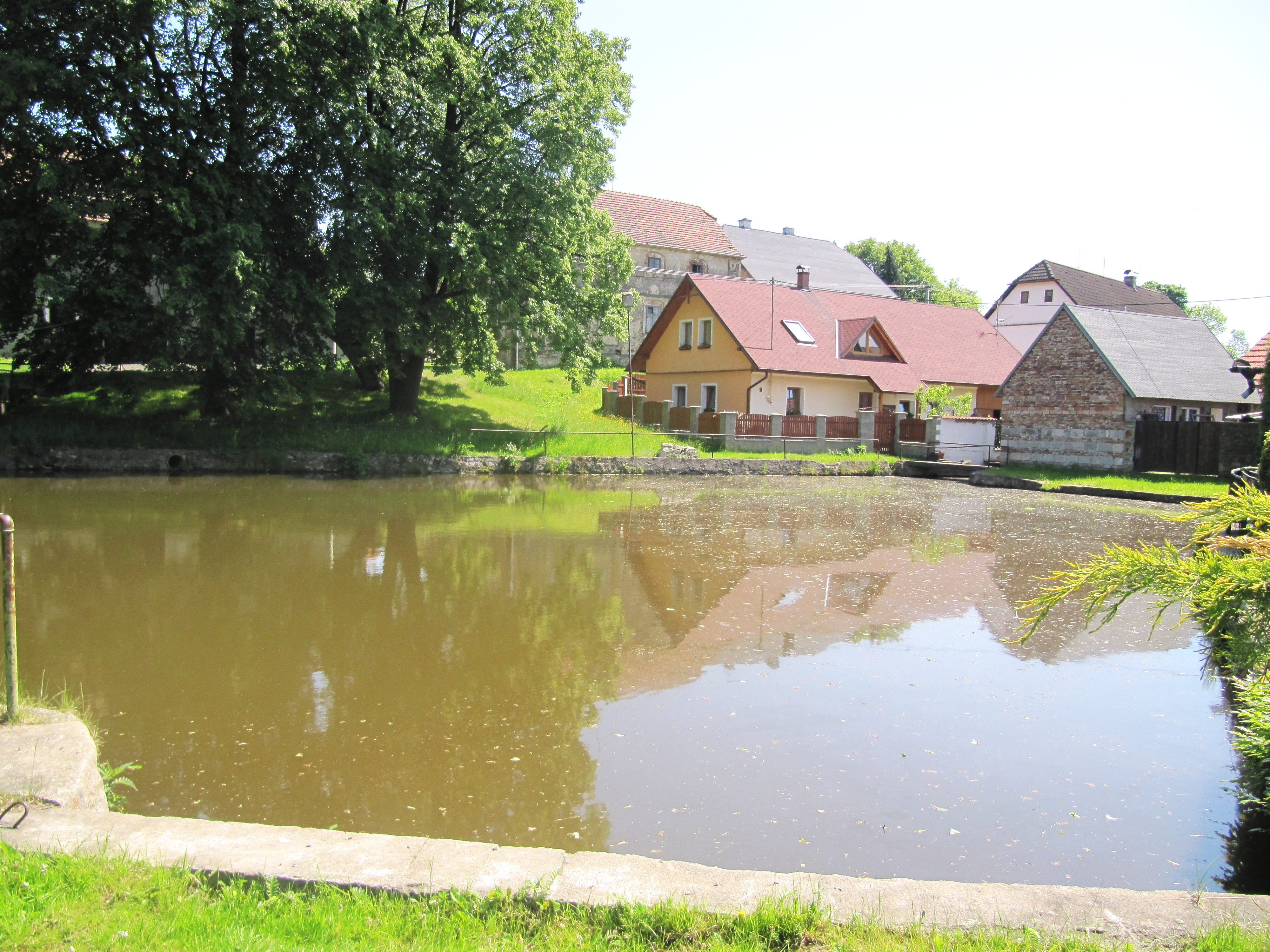 Onomyšl